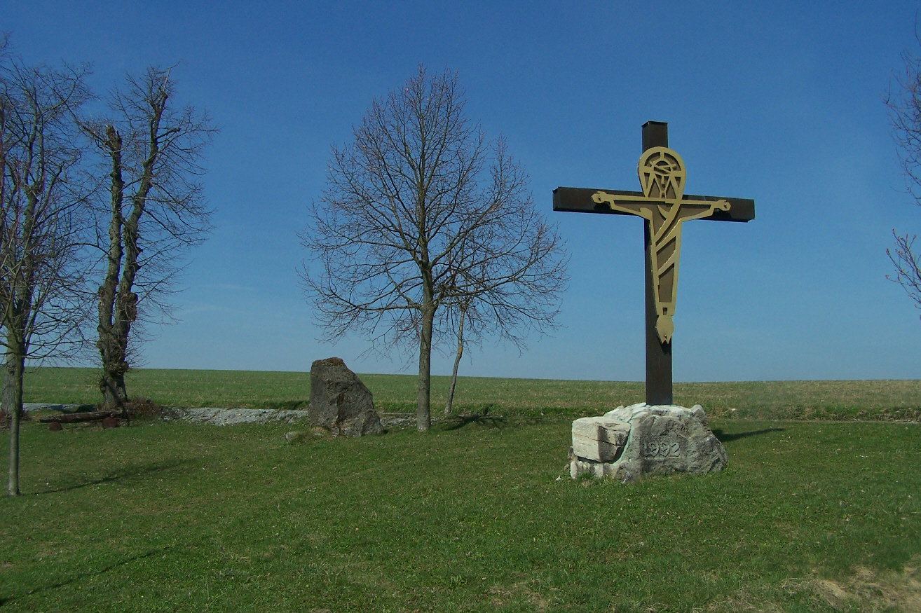 Andachtsort in der Flur bei Katharinenberg im Obereichsfeld.